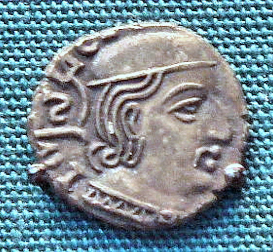 Rudrasena I portrait